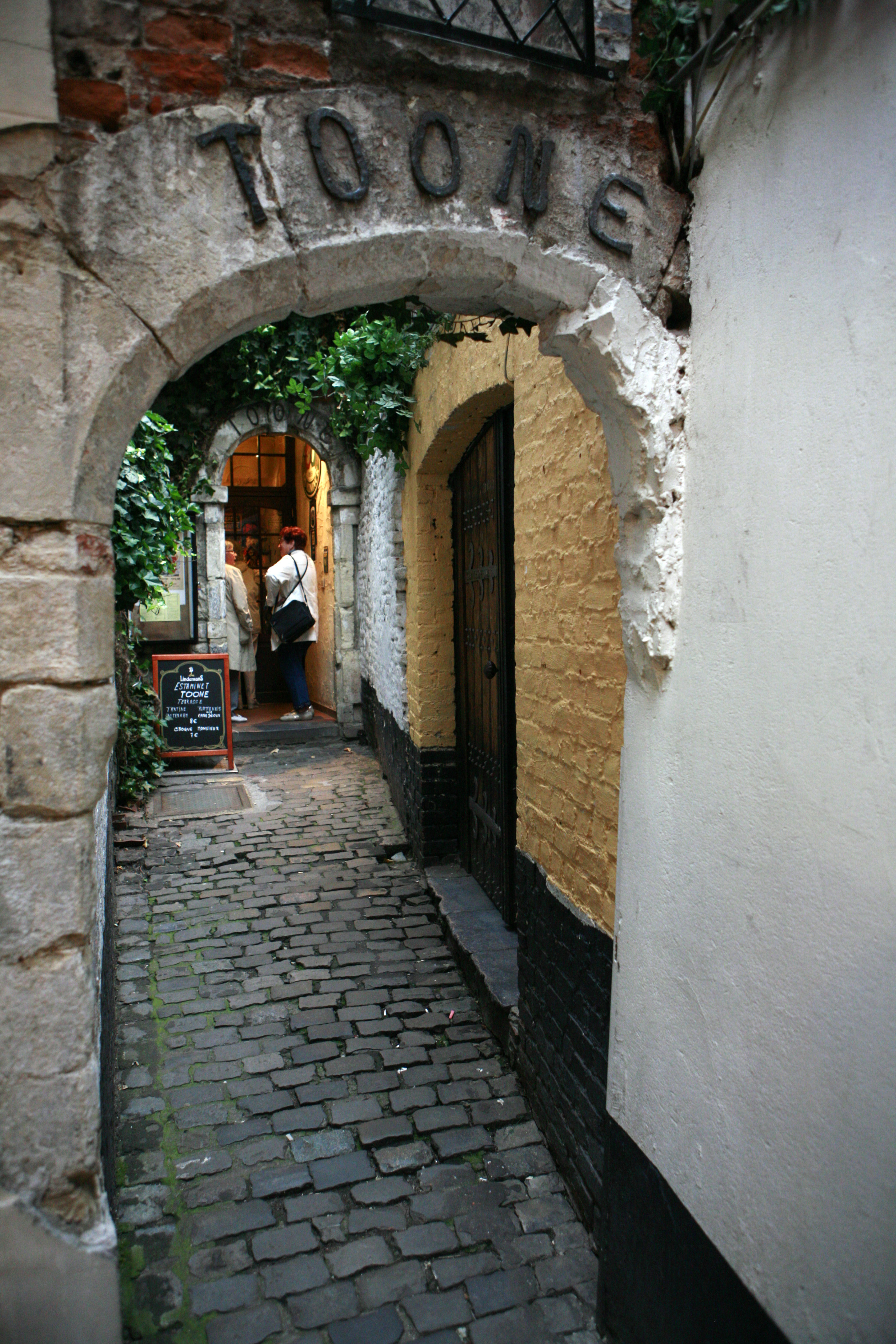 Koninklijk theater Toone